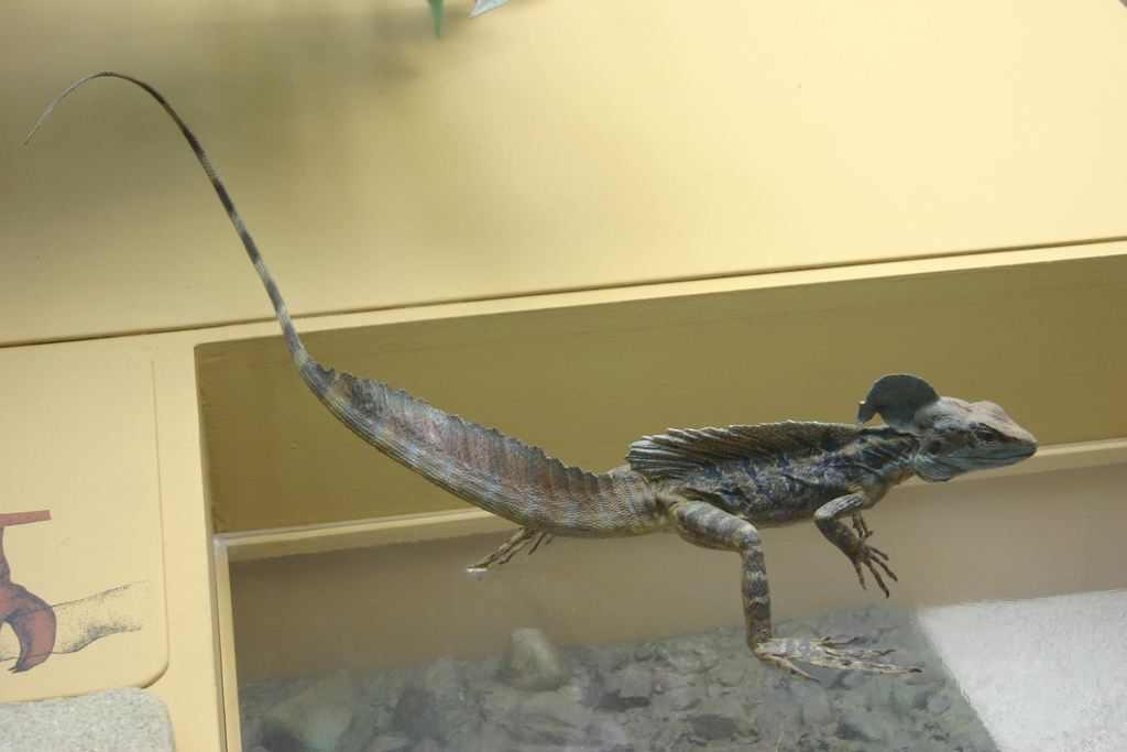 Basiliscus basiliscus